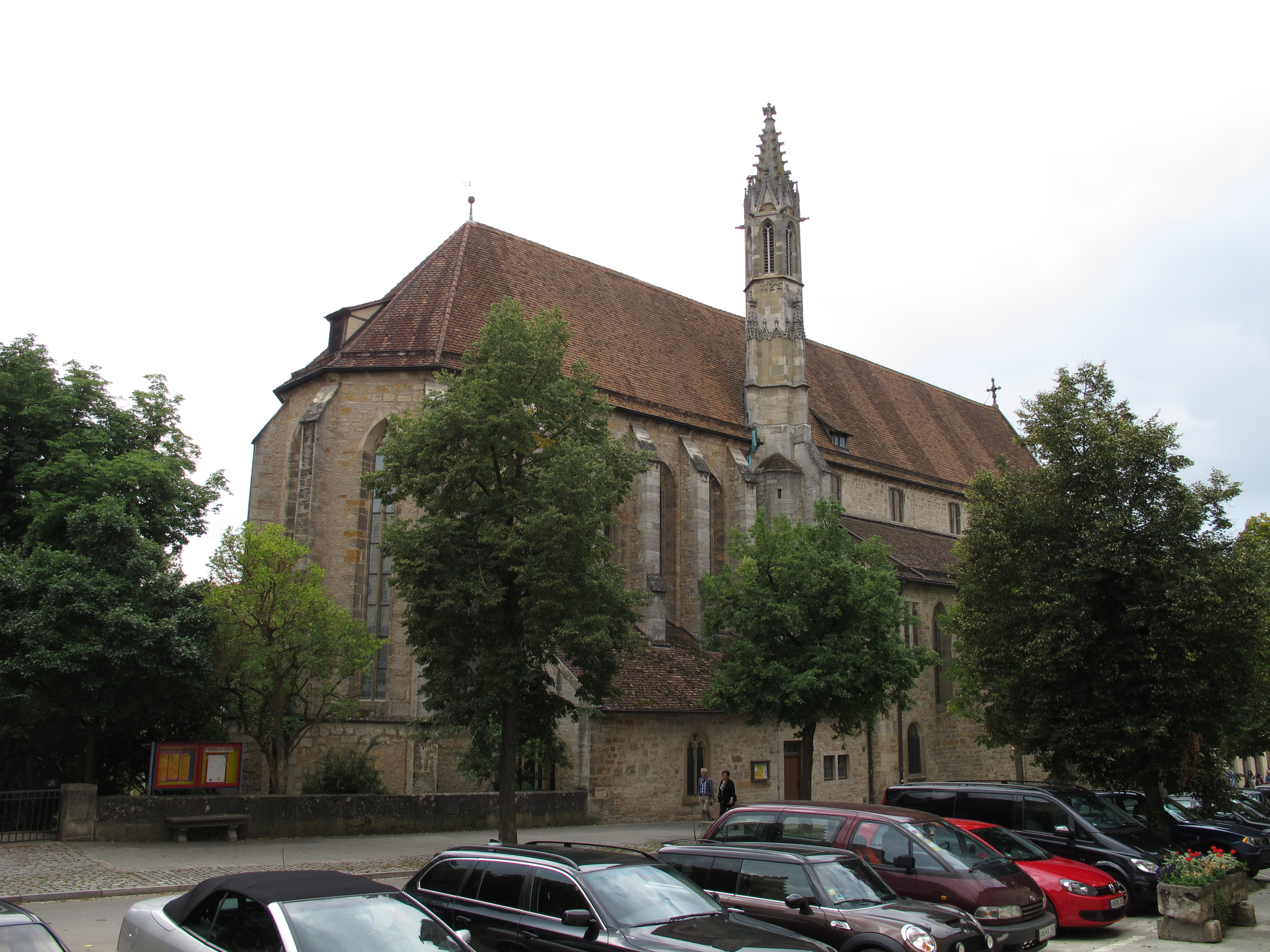 Franziskanerkirche in Rothenburg odT, Außenansicht